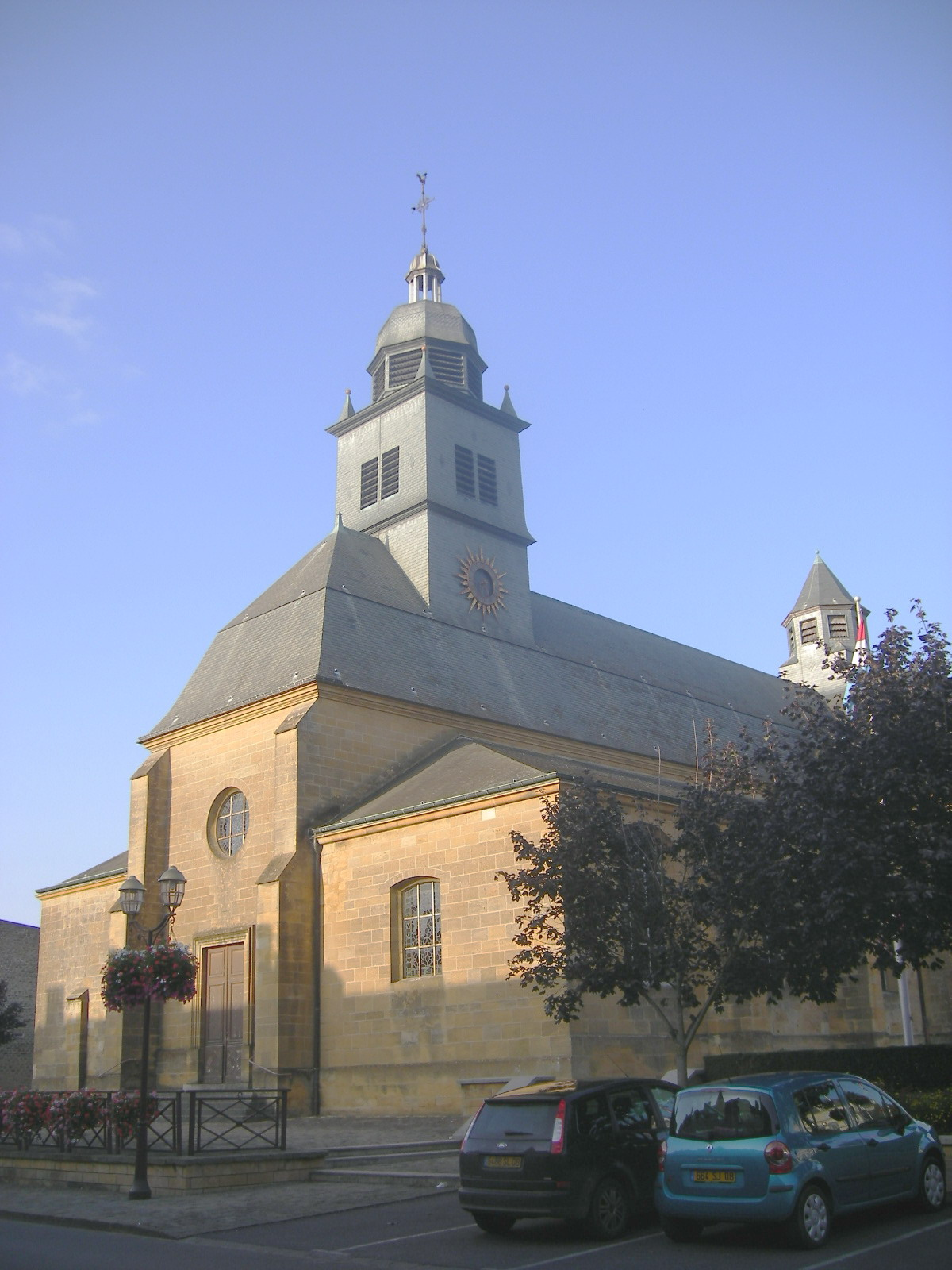 L'église de Carignan